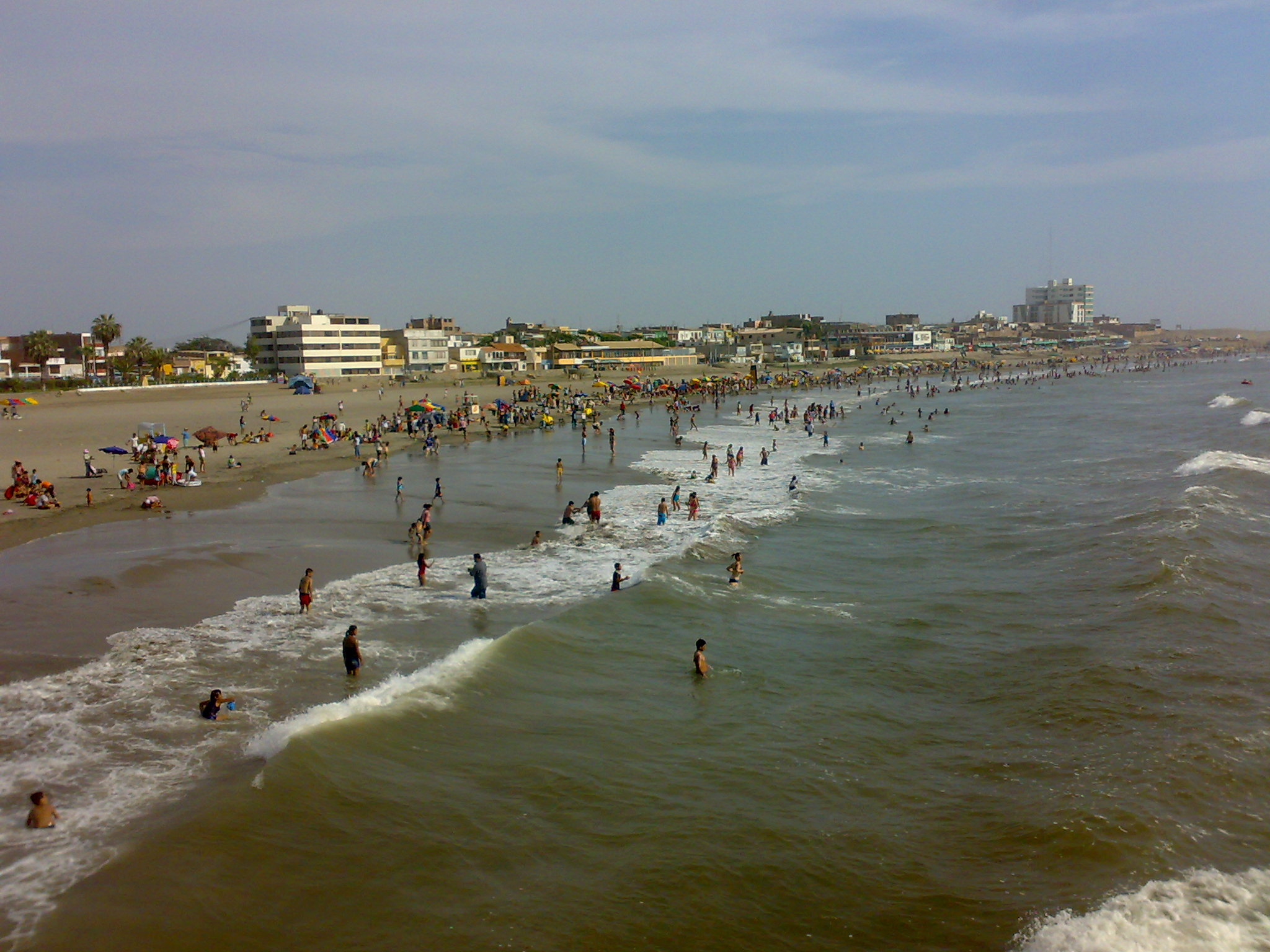 Foto de la playa de Pimentel desde el muelle. Distrito de Pimentel, Provincia de Chiclayo, departamento de Lambayeque, Perú.